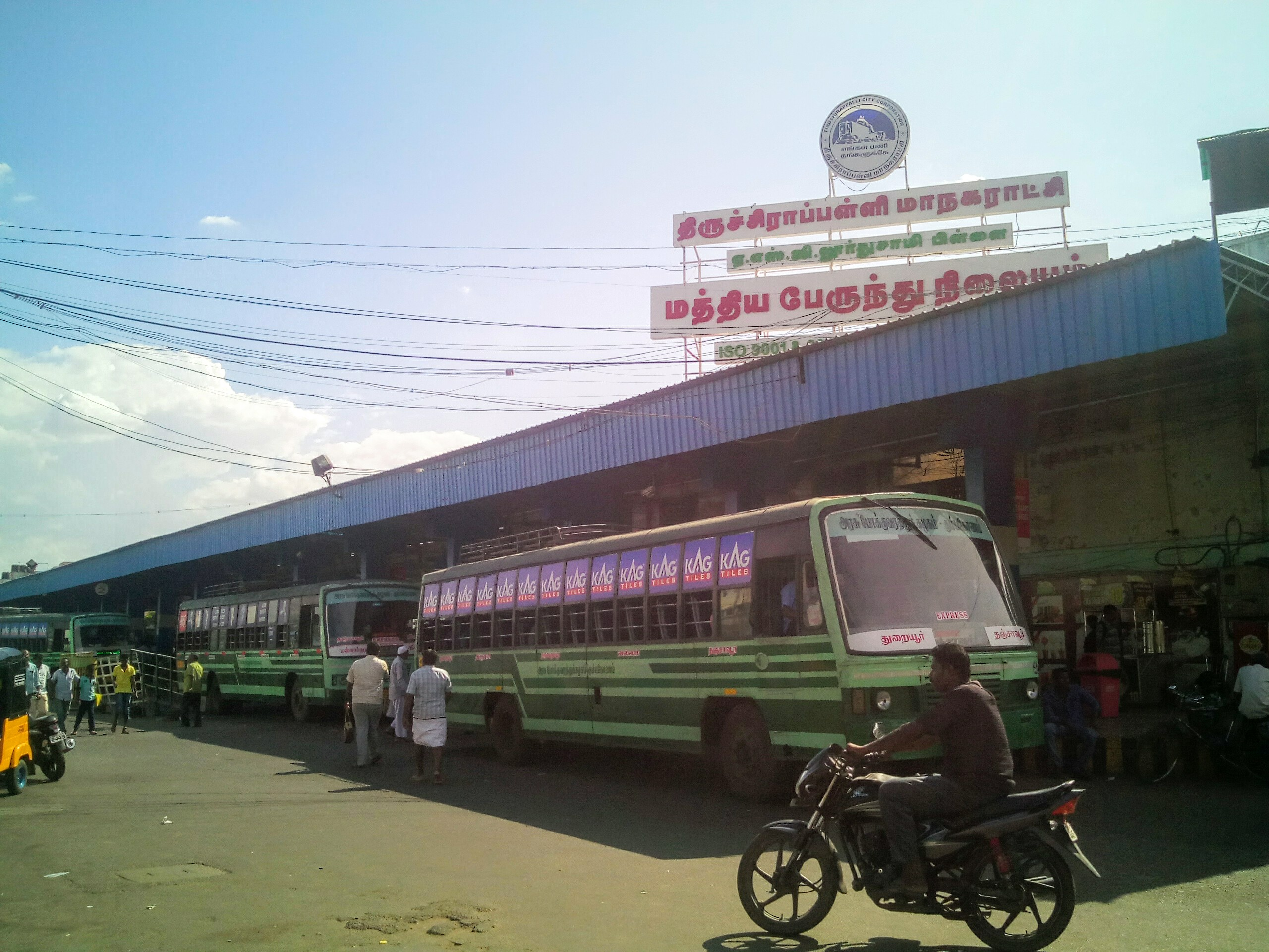 திருச்சி மத்திய பேருந்து நிலையத்தின் நுழைவாயில்..